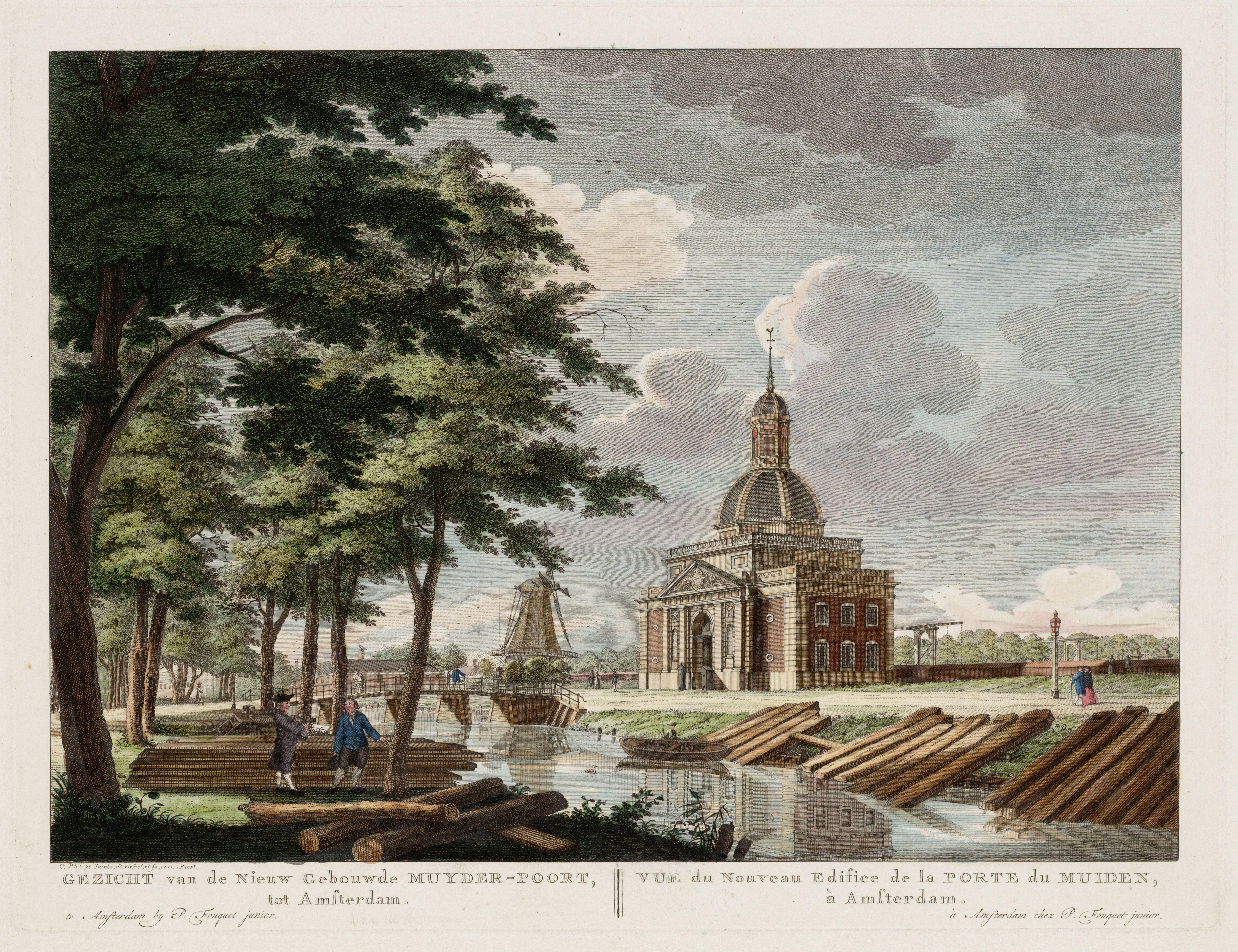 Beschrijving Gezicht van de Nieuw Gebouwde Muyder-Poort, tot Amsterdam Tweede Muiderpoort gezien vanuit de Plantage, over de Plantage Muidergracht. Prent 25 uit de Atlas van Fouquet. Ets, handgekleurd. Documenttype prent Vervaardiger Philips Jacobsz., C. (Caspar; 1732-1789) Fouquet, Pierre (1729-1800) Collectie Collectie Atlas Dreesmann Datering 1771 Geografische naam Plantage Muidergracht Sarphatistraat Gebouw Muiderpoort Inventarissen Afbeeldingsbestand 010094005819 Generated with Dememorixer